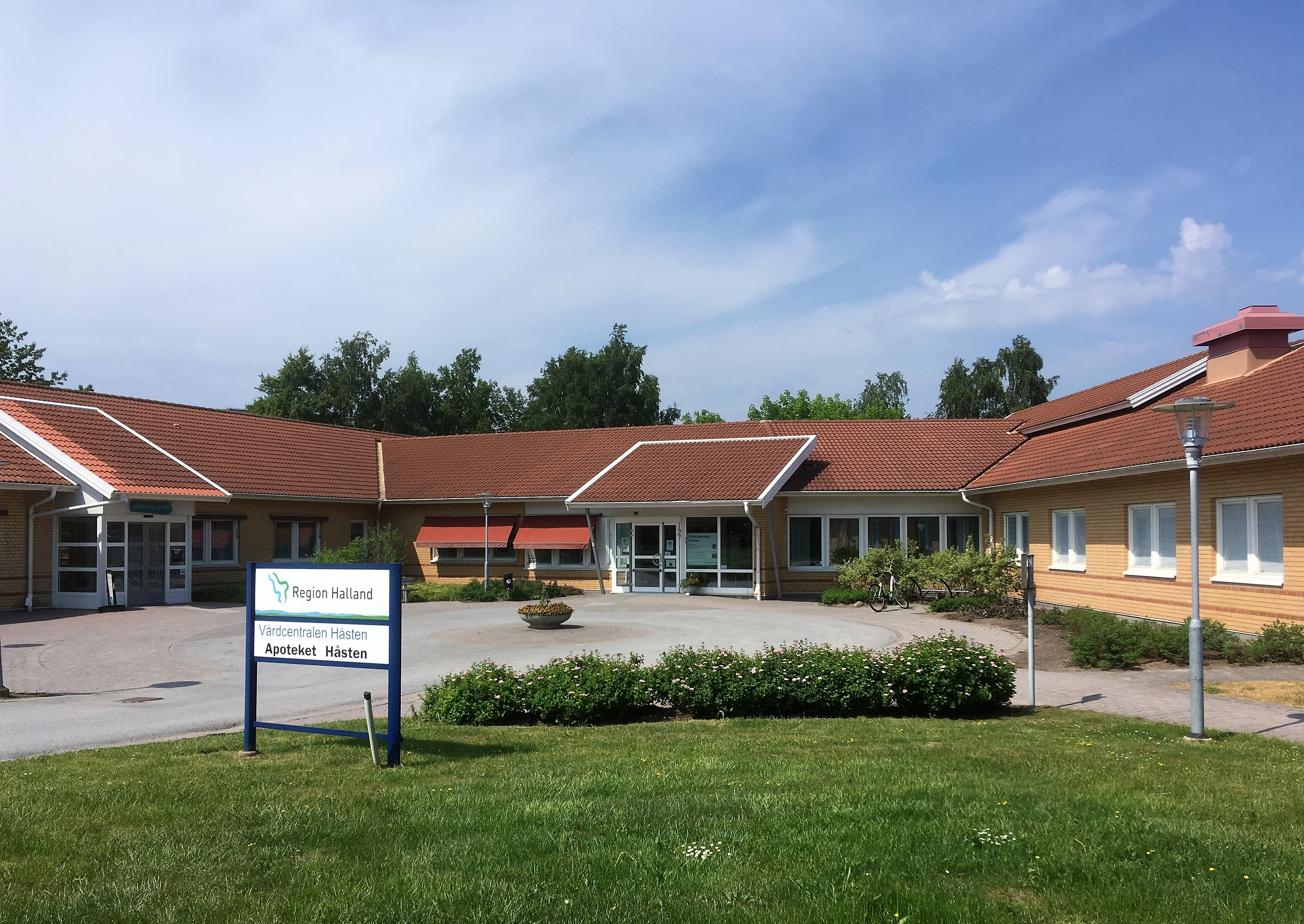 Håstens Vårdcentral och Apotek, Varberg, Halland